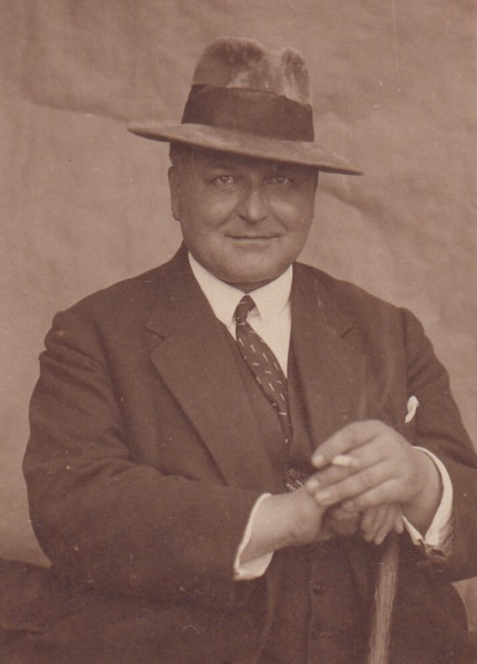 Archiwalna fotografia Hermanna Herrenbergera